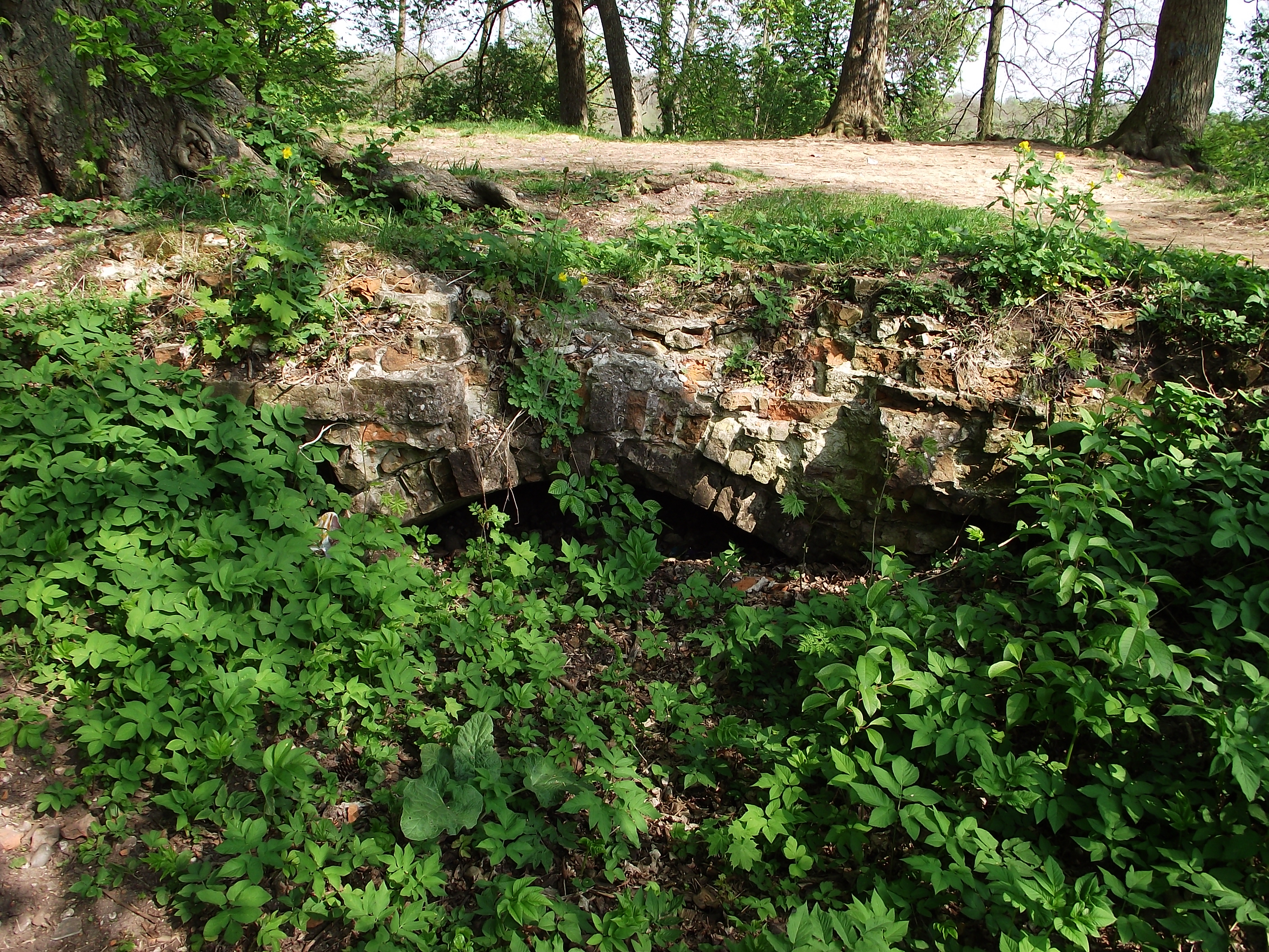 Mirosławiec, ul. Krótka - relikty zamku (majdan zamkowy z fosą), XIV/XV, XVIII